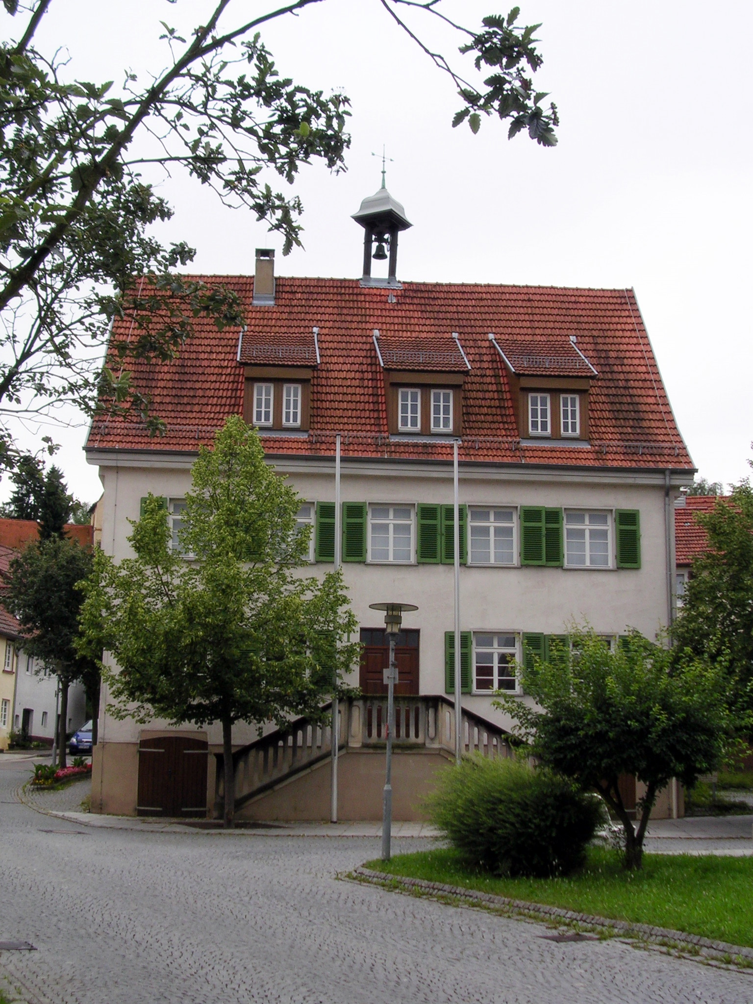 Altes Rathaus in Deizisau (Old Townhall, Deizisau, Germany)